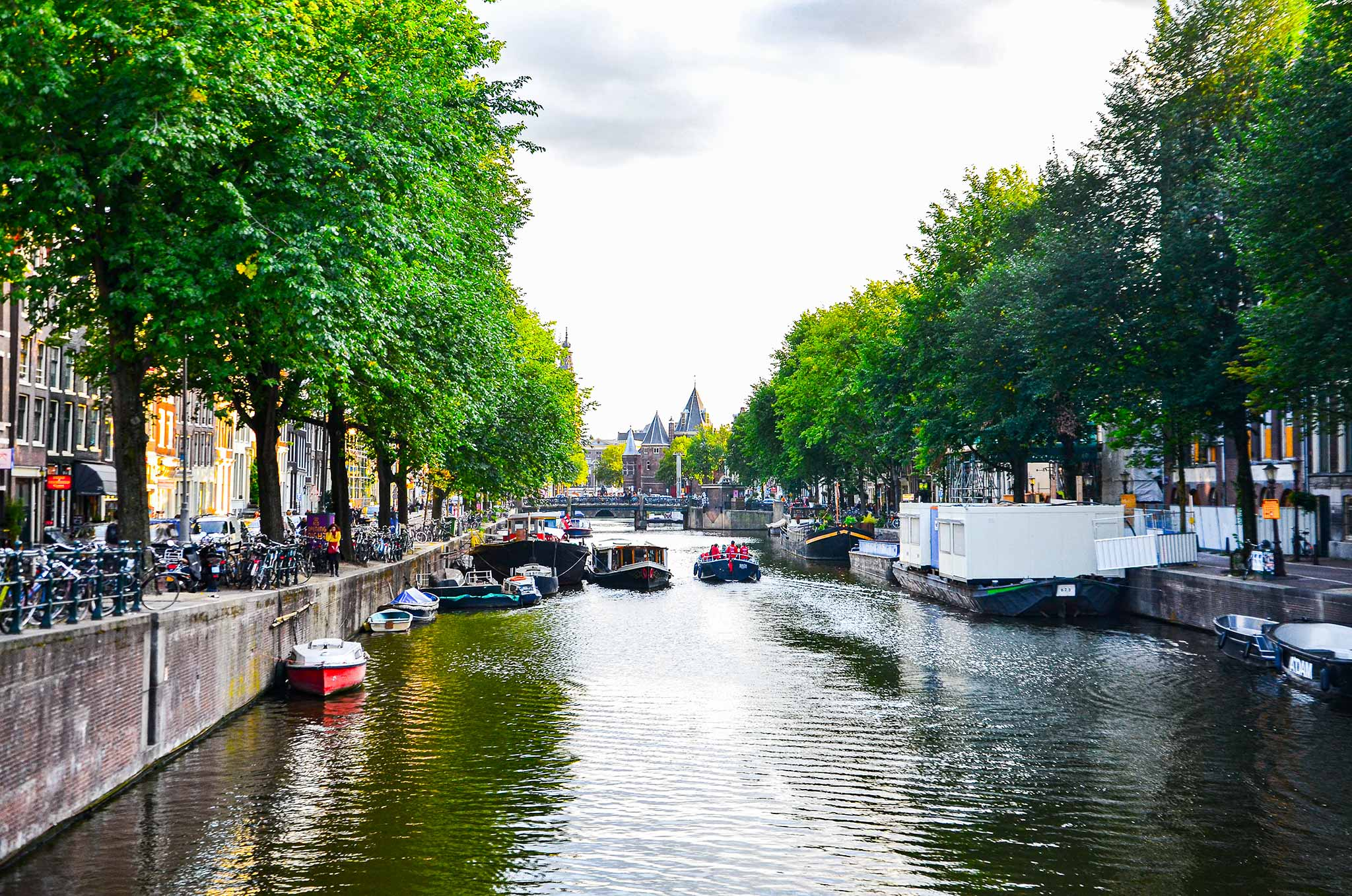 Amsterdam su kanallarında bulunan teknelerden bazıları yaşam alanı olarak kullanılıyor.